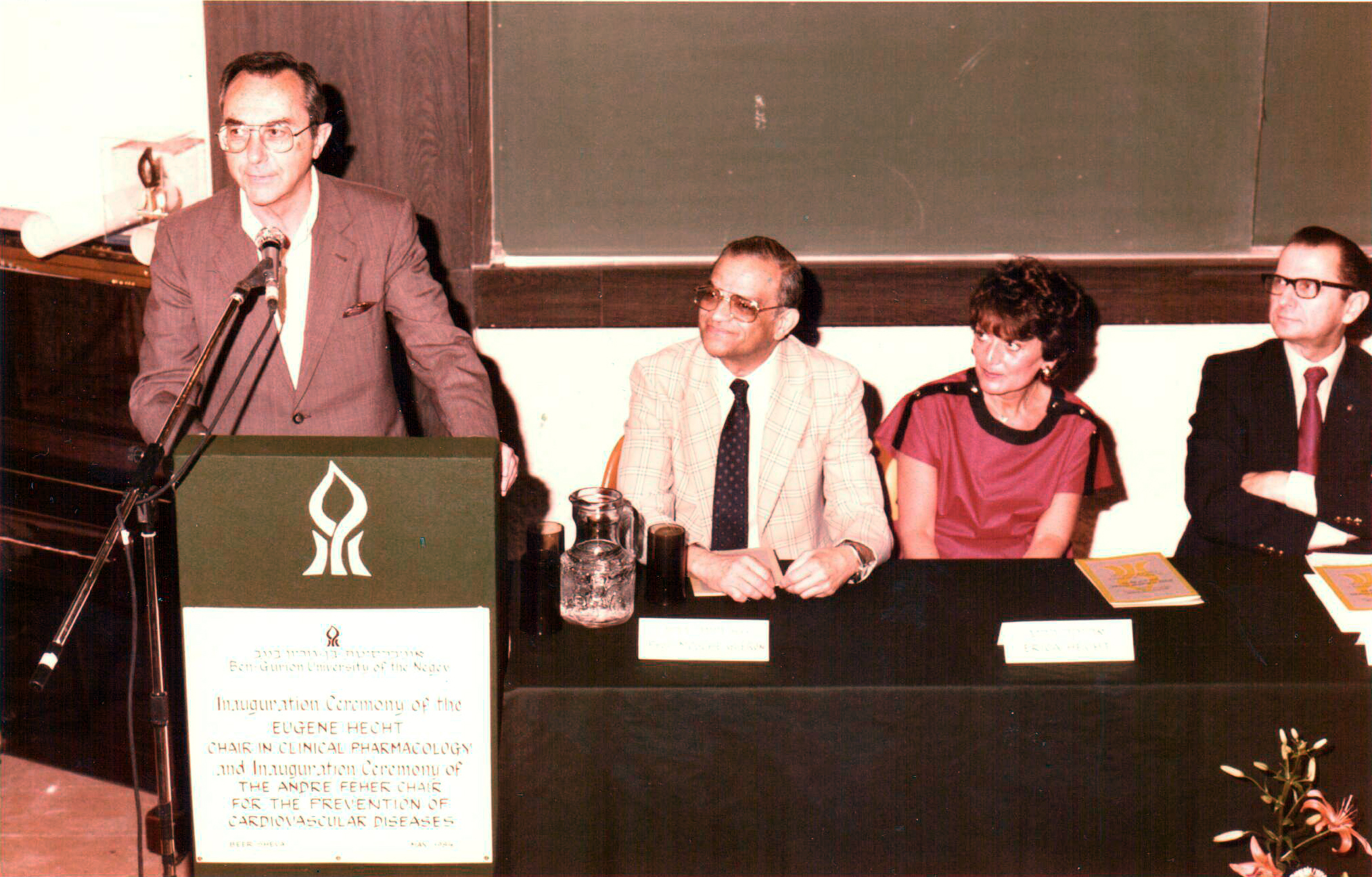 משה ארנס ז"ל נואם ב[אוניברסיטת בן גוריון . מימינו ופרופ' משה גרון ז"ל ואריקה הכט.